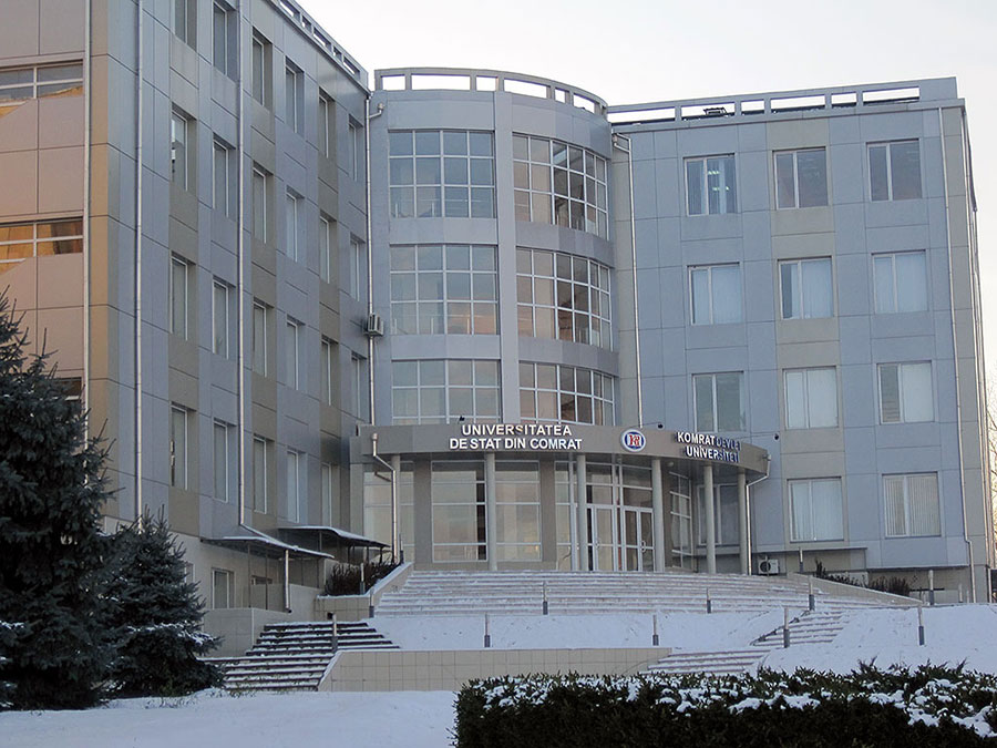 Комратский государственный университет